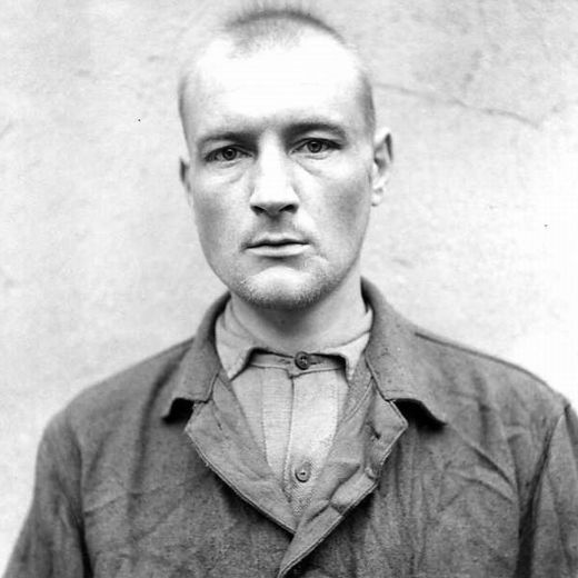 Porträtfoto des im Bergen-Belsen-Prozess angeklagten Oscar Schmitz (23.2.1916 in Köln), Lagerältester im Kasernenlager Bergen-Belsen sowie Häftling im KZ Mittelbau-Dora; am 17.11.1945 freigesprochen. Das Bild wurde von einem Angehörigen der Royal Corps of Signals aufgenommen und befindet sich als Original im Bestand "War Office Second World War Official Collection. The Liberation of Bergen-Belsen Concentration Camp 1945: Portraits of Belsen guards at Celle awaiting trial, August 1945" des Imperial War Museums in London. / Das Foto wurde im März 2003 aus den Beständen des Imperial War Museums in London beschafft.